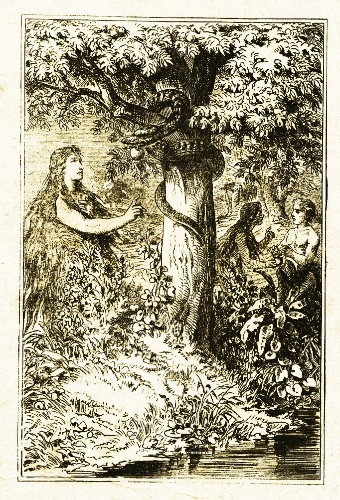 Lilith. Rycinia ze schrobenhausenowskiego warsztatu Carla Poellath